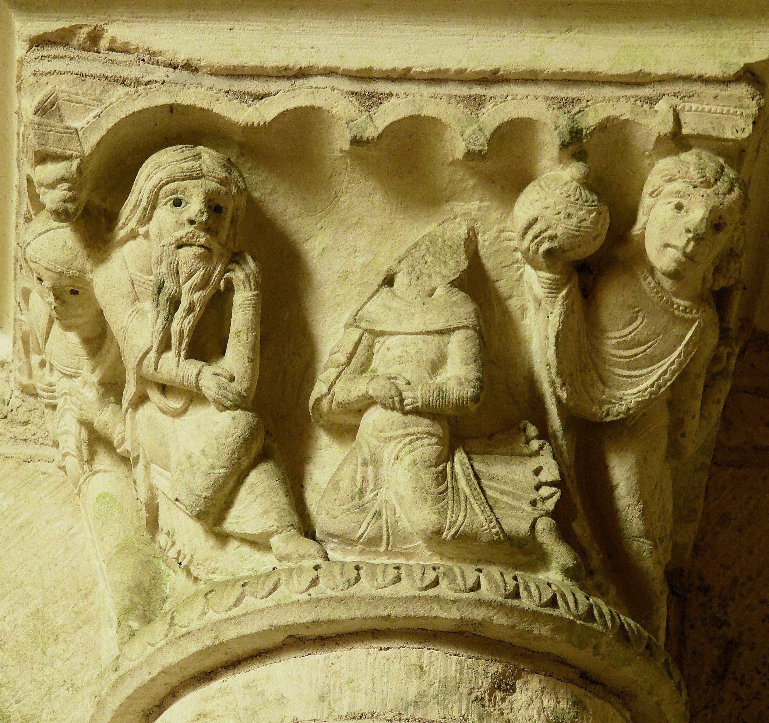 Gargilesse-Dampierre - Eglise Notre-Dame - Croisillon Sud - Chapiteau de la Tentation du Juge : le juge est représenté par un personnage assis et une femme derrière tente de le corrompre